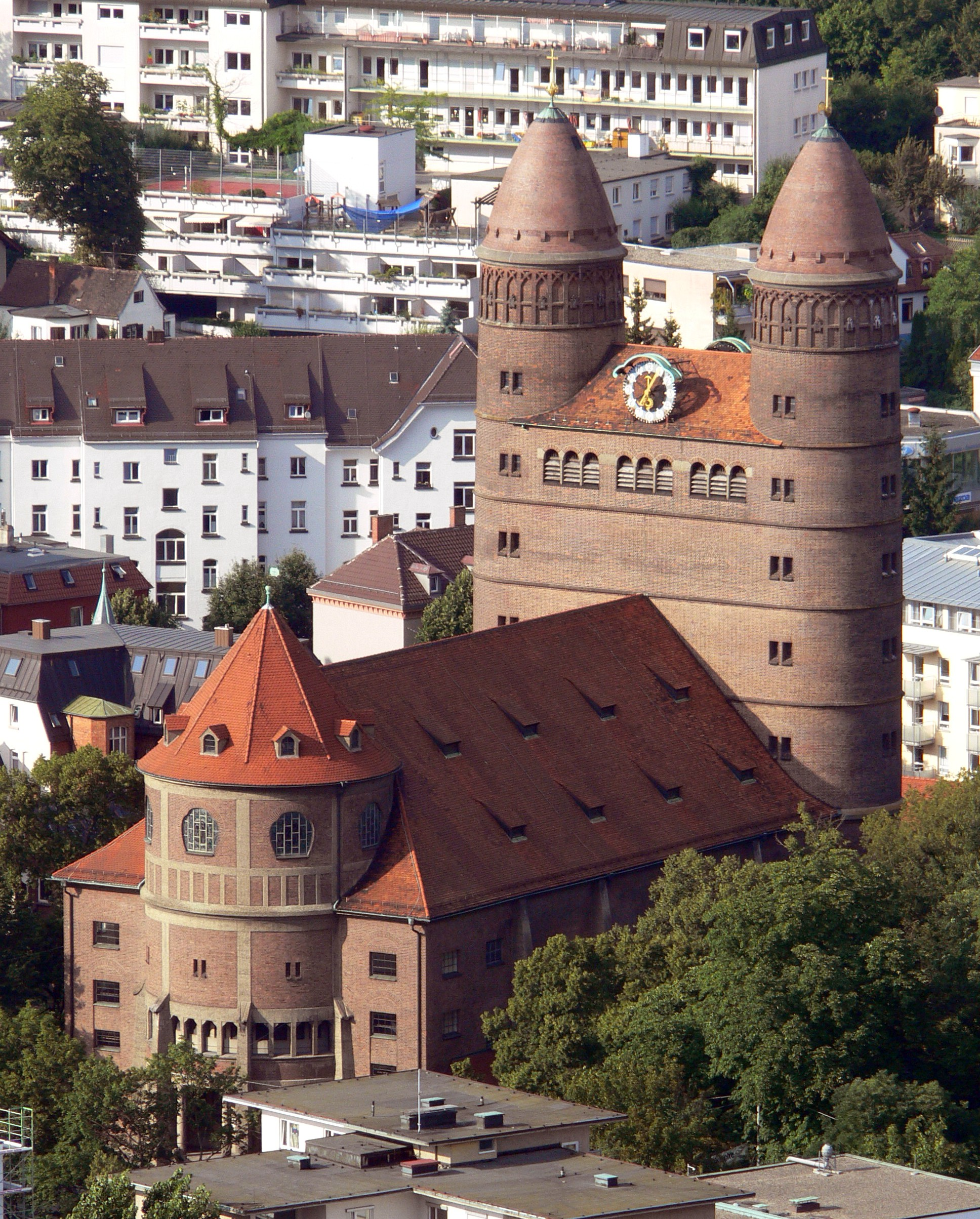 Pauluskirche Ulm, fotografiert vom Münster